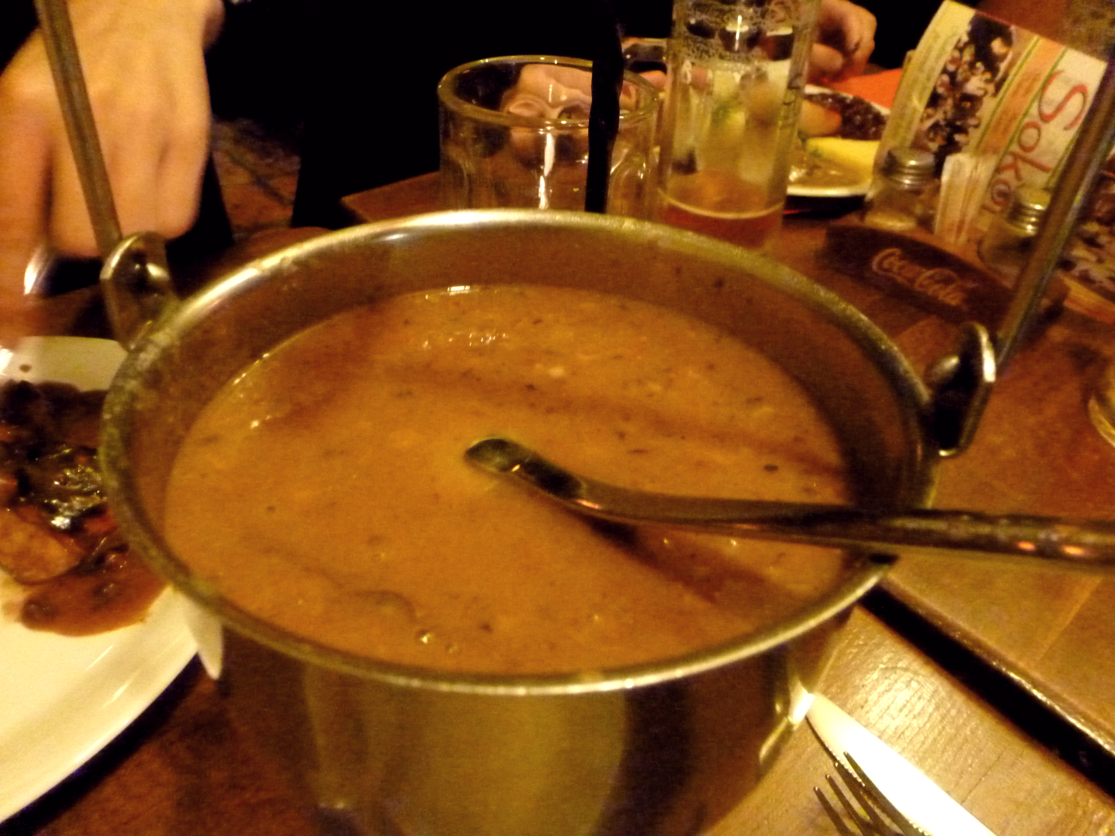 Récipient à goulash en Slovénie.